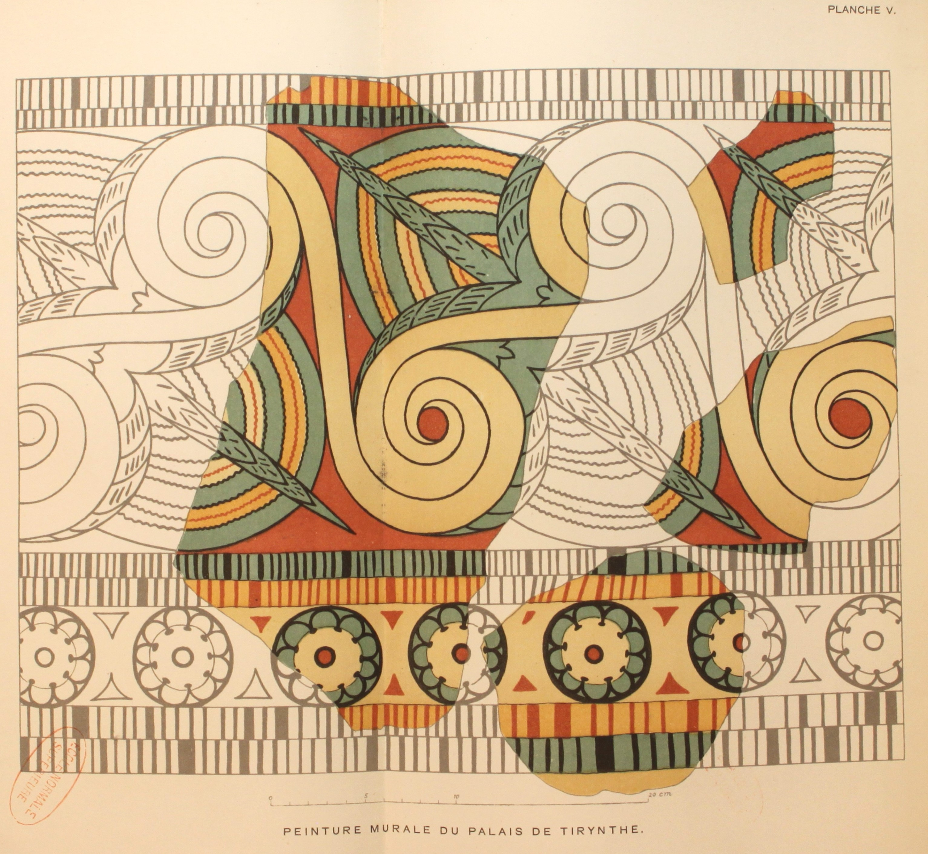 Frise murale du palais de Tirynthe. Planche V de l'ouvrage dirigé par Heinrich Schliemann, "Tirynthe. Le palais préhistorique des rois de Tirynthe. Résultats des dernières fouilles", Paris, C. Reinwald libraire-éditeur, 1885.